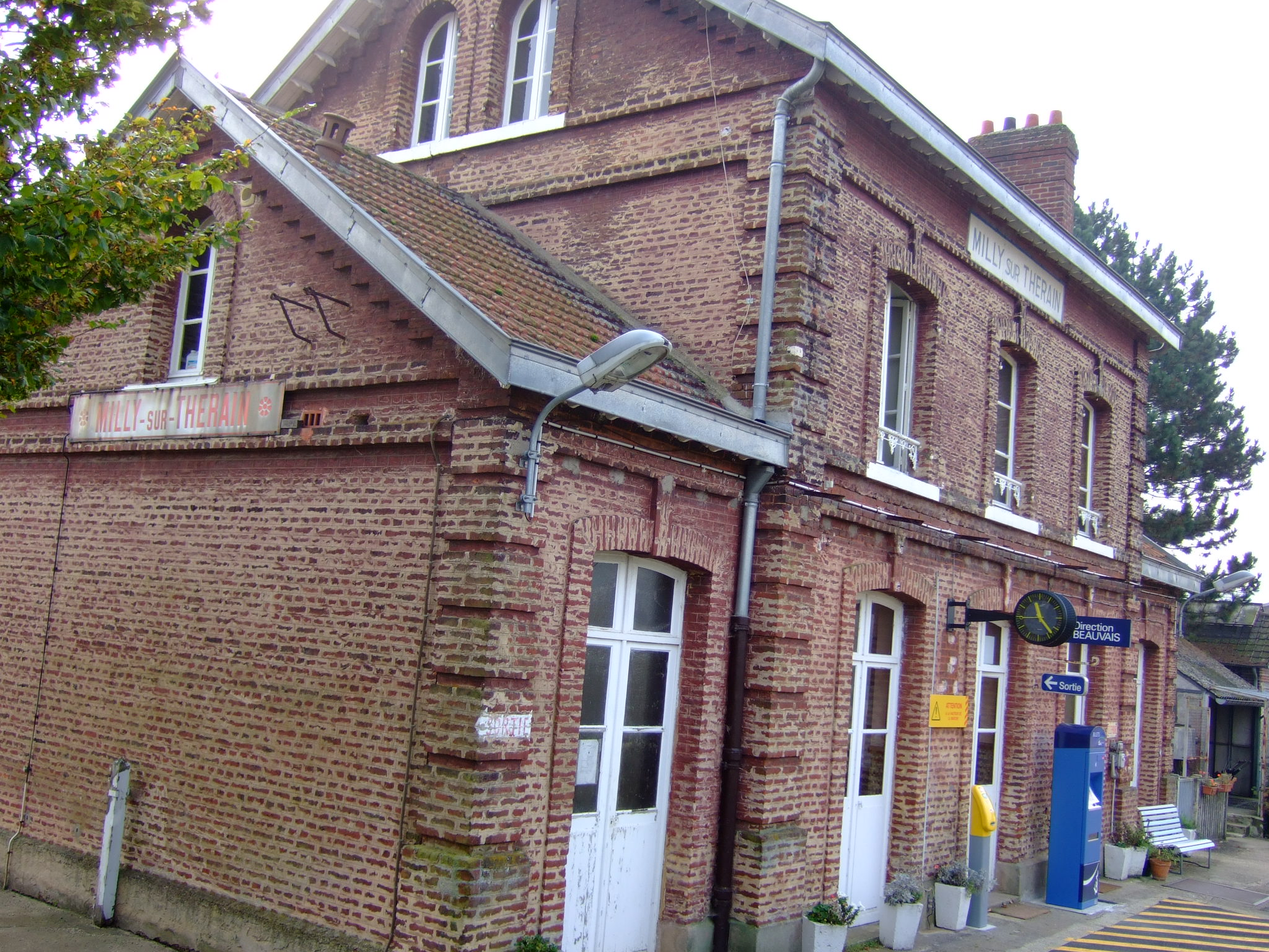 La gare vue depuis un TER en direction de Beauvais